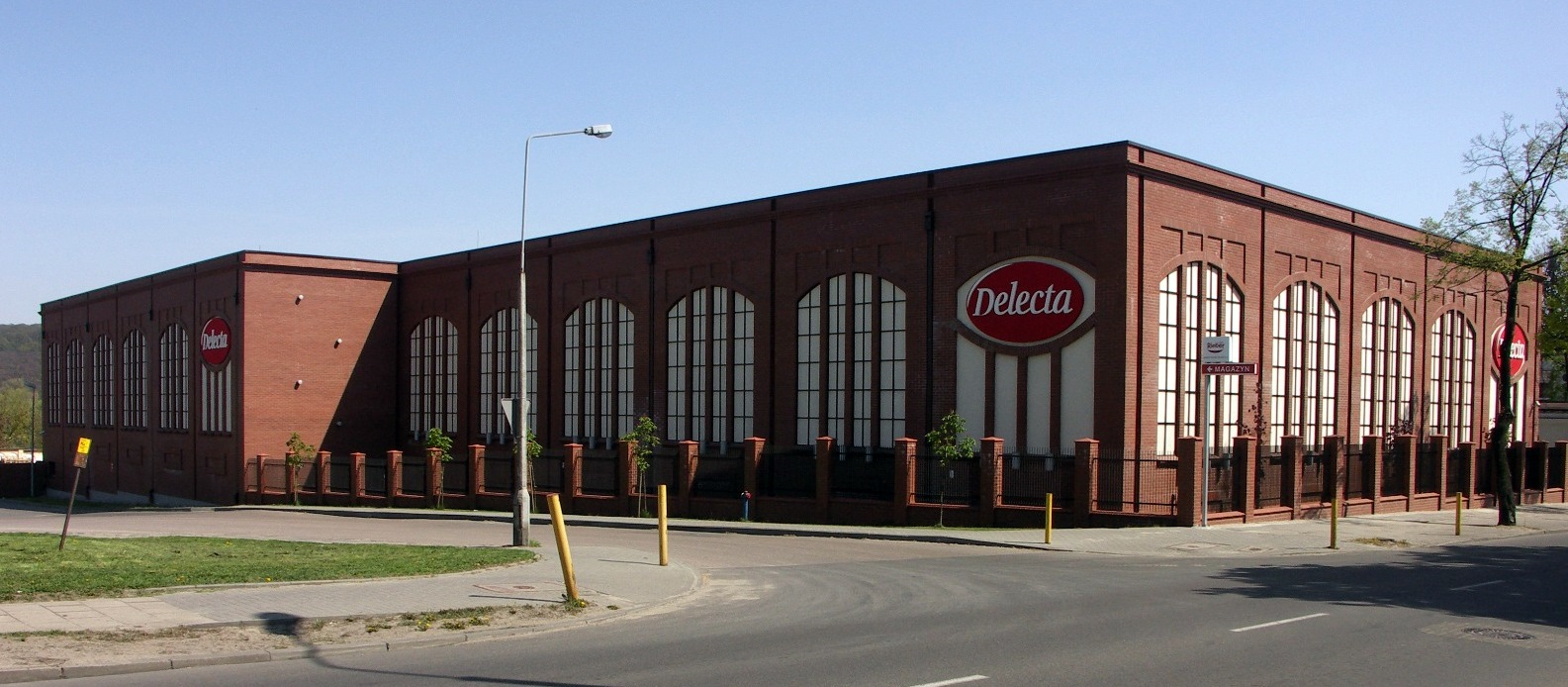 Wcześniej Delecta, teraz Rieber